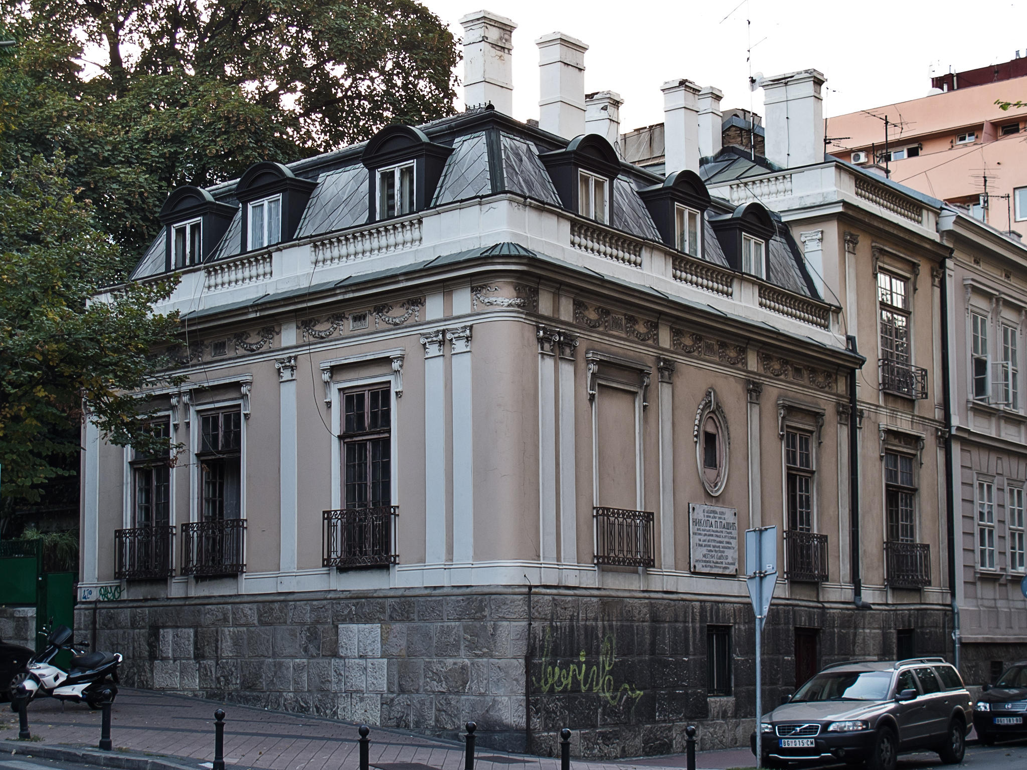 Кућа Николе Пашића, Француска 21, Стари град, Београд, Србија